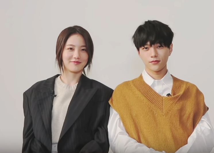 우리집 고양이 혹은 강아지가 사람이면 얼마나 좋을까? 같이 맛있는 것도 먹으러 다니고, 무슨 생각을 하는지 물어볼 수도 있을텐데. 반려동물을 기르는 사람이라면 누구나 한 번쯤 해봤을 생각들. 드라마 '어서와'는 사람이 된 고양이 홍조(김명수)와 강아지 같은 여자 솔아(신예은)의 만남을 통해 이런 상상을 현실로 이뤄준다. 귀엽고 사랑스러워 보이는 이 이야기는 괜찮다고 여기며 앞만 보던 삶을 위로해주는 방향으로 나아가게 한다. 판타지인 걸 알면서도 우리는 늘 이런 순간을 꿈꿔왔을지도 모른다. 그나저나, 사람이 된 고양이와 강아지 같은 여자는 서로를 얼마나 잘 알고 있을까?